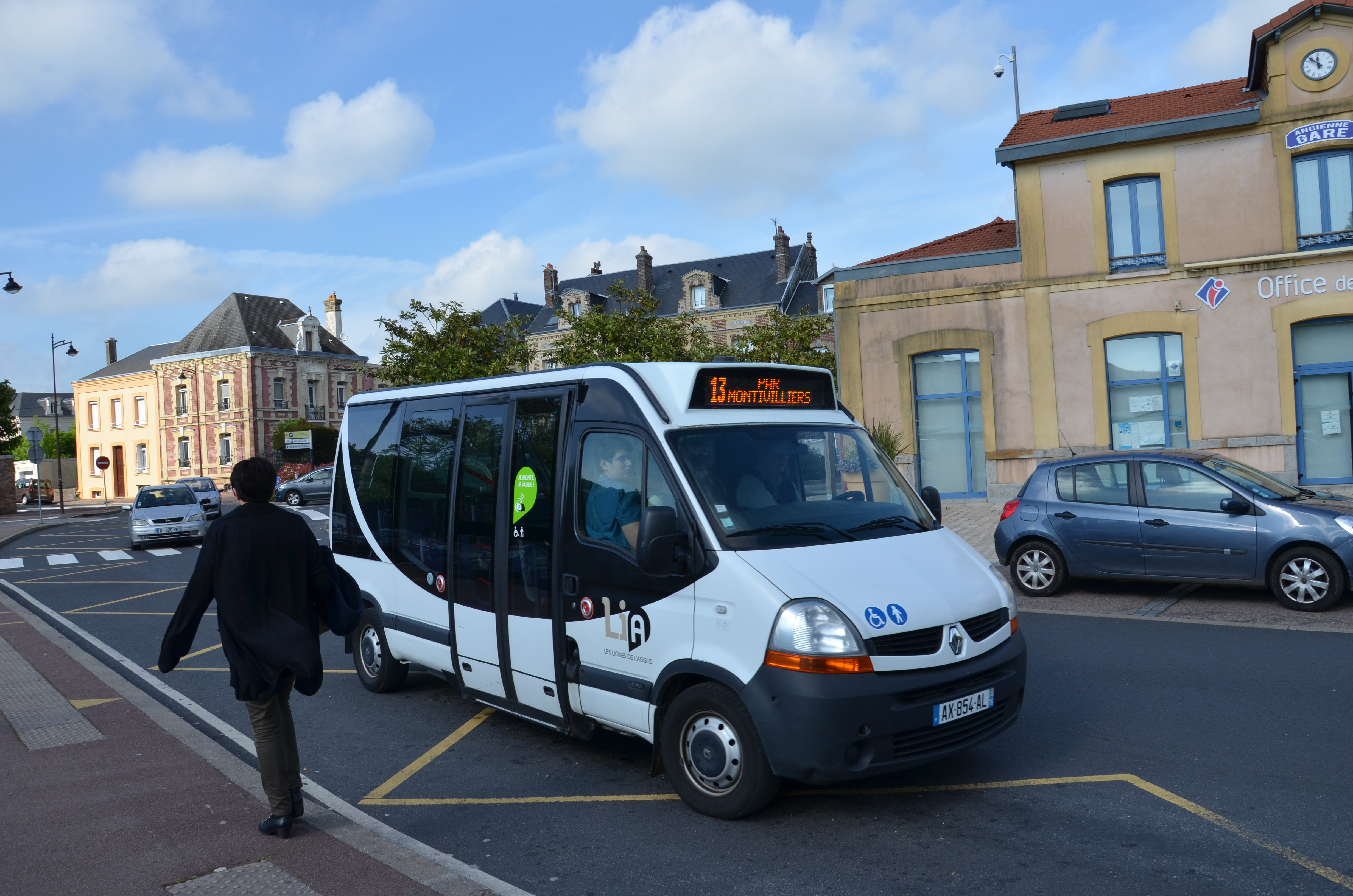 Renault Master aperçu sur la ligne 13 du réseau LiA, à la gare de Montivilliers.